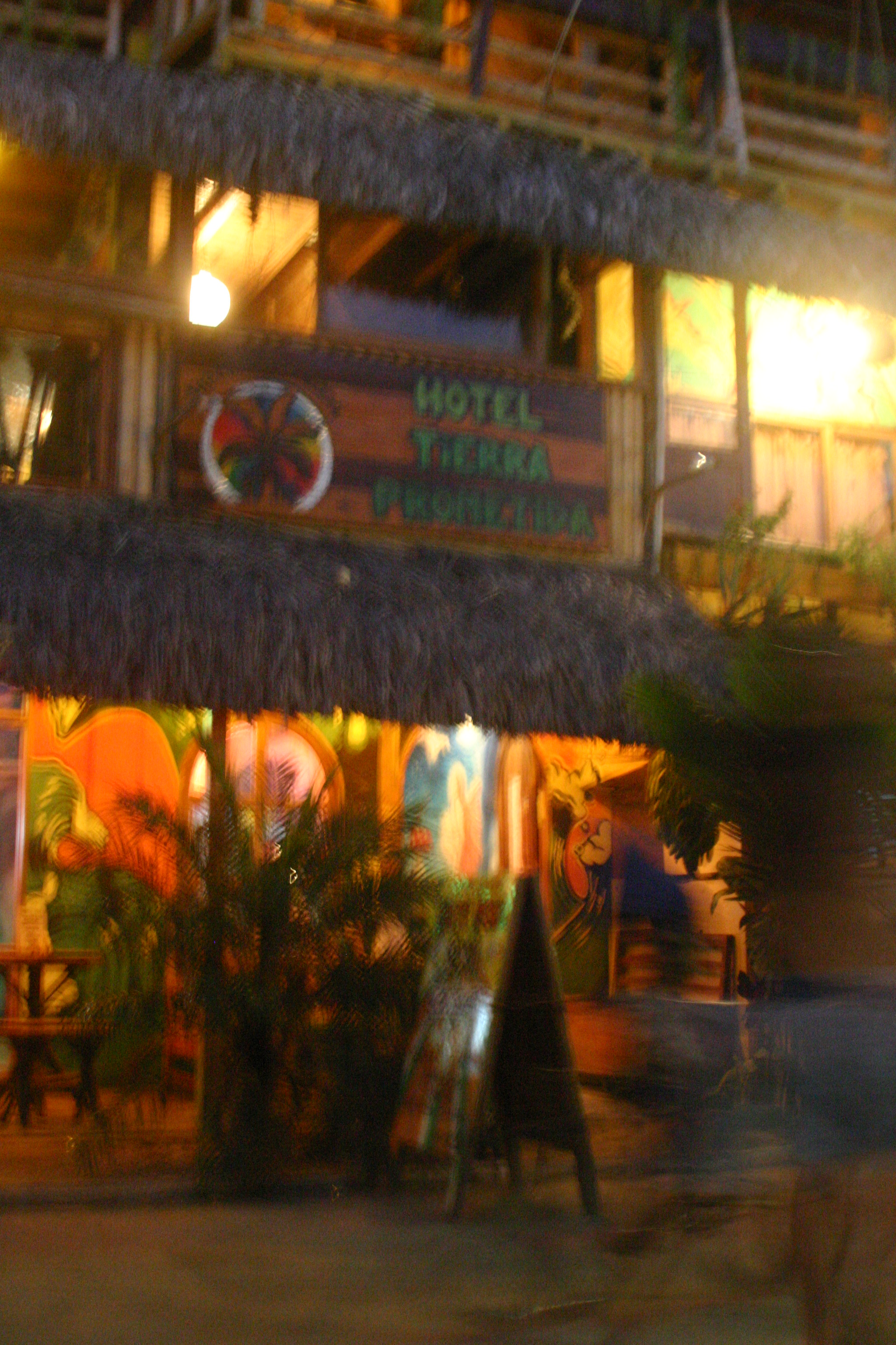 Salinas - Ecuador Author: Usuario:Alfredo Molina Date: 26 March 2005